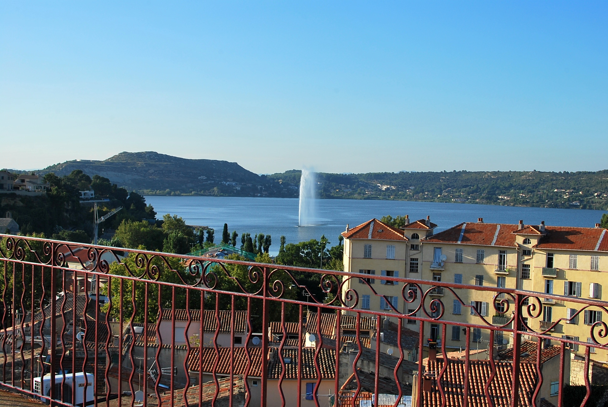 Etang de l'oliver vu depuis la vieille ville d'Istres